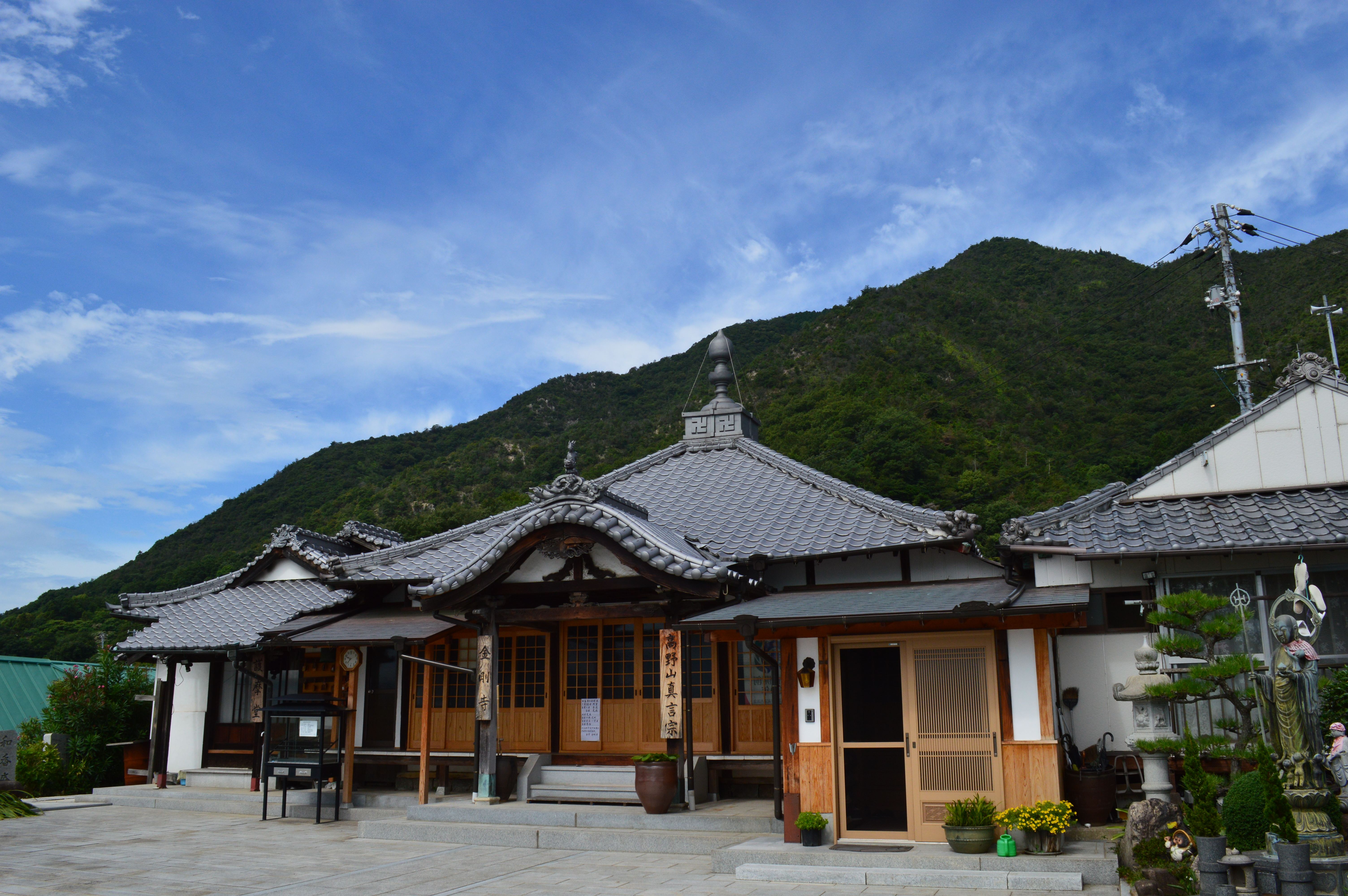 広島県の大崎上島にある金剛寺、背後は神峰山